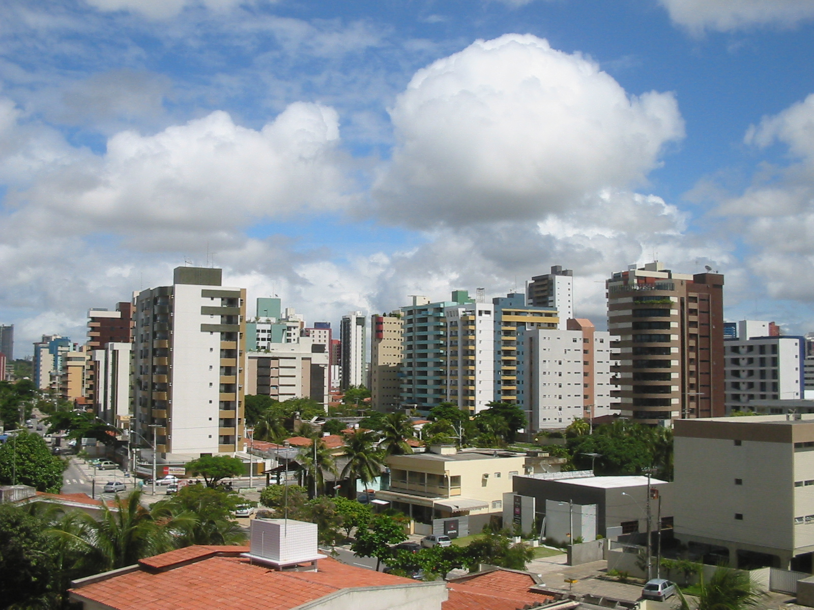 João Pessoa (Paraíba), Brasil. Bairro de Tambaú. Foto tirada a partir do Hotel Caiçara. João Pessoa (Paraíba), Brazil. Tambaú district.